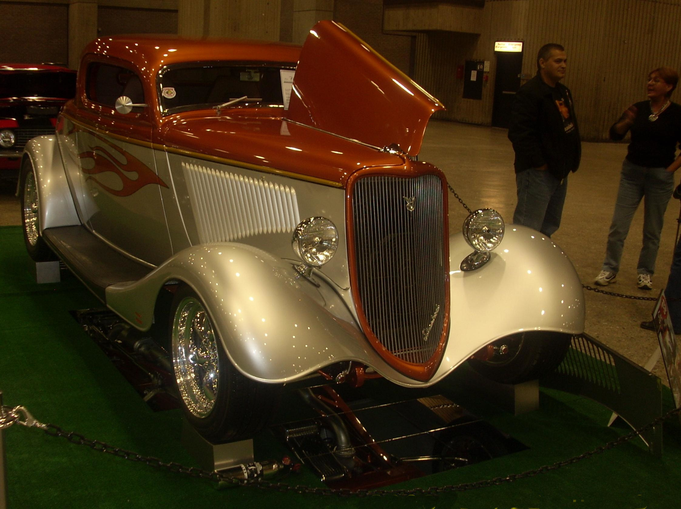 1933 Ford Model B photographed at Auto classique Montréal 2008.